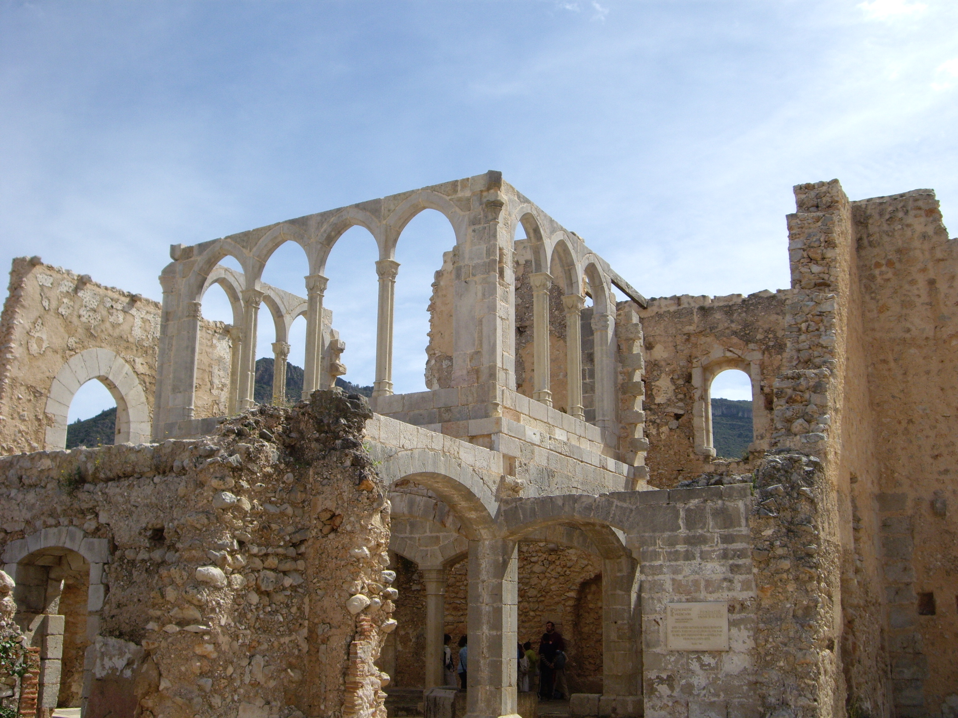 Palau de l'abat amb el sobreclaustre.